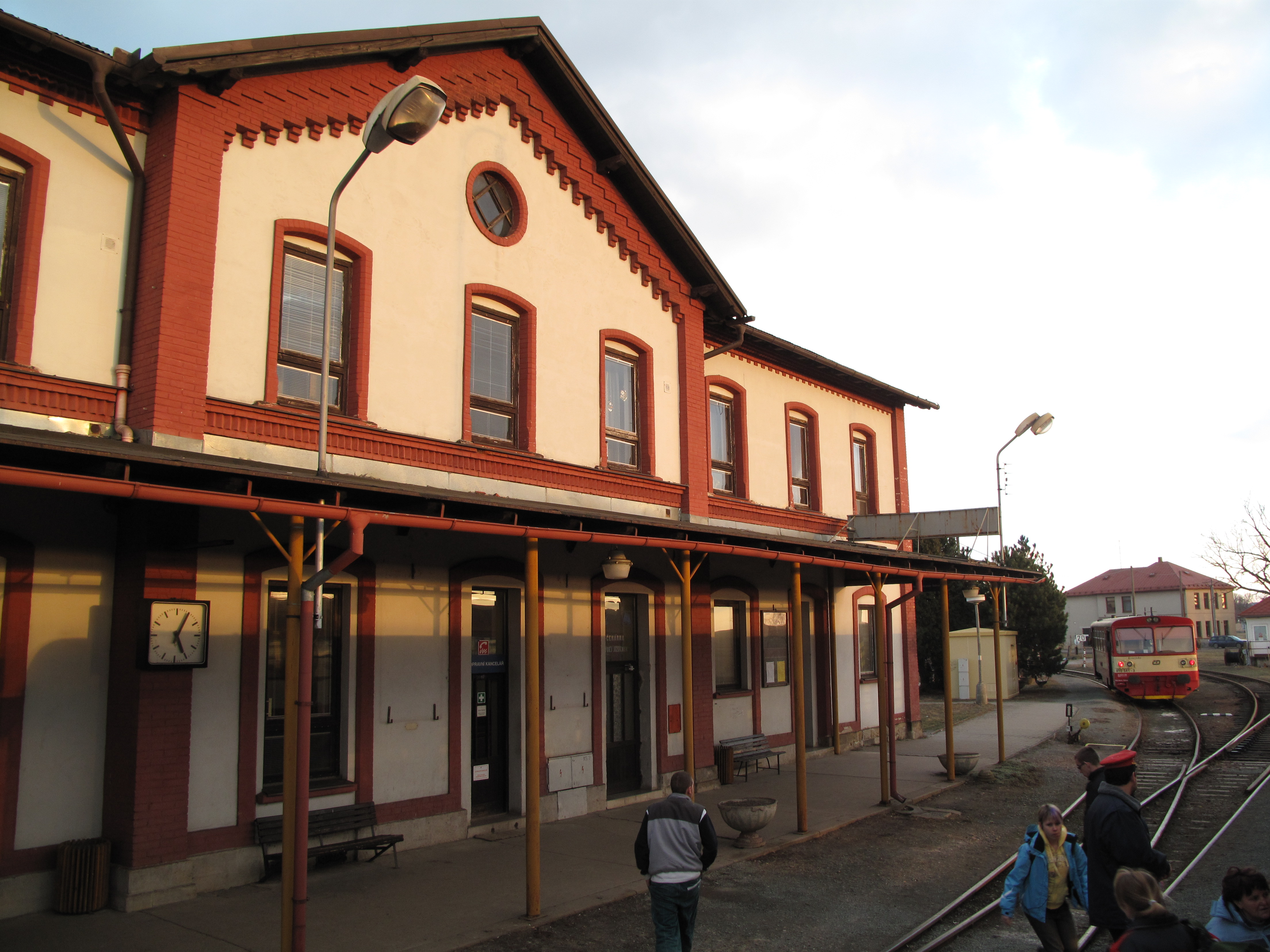 železniční stanice Opočno pod Orlickými horami